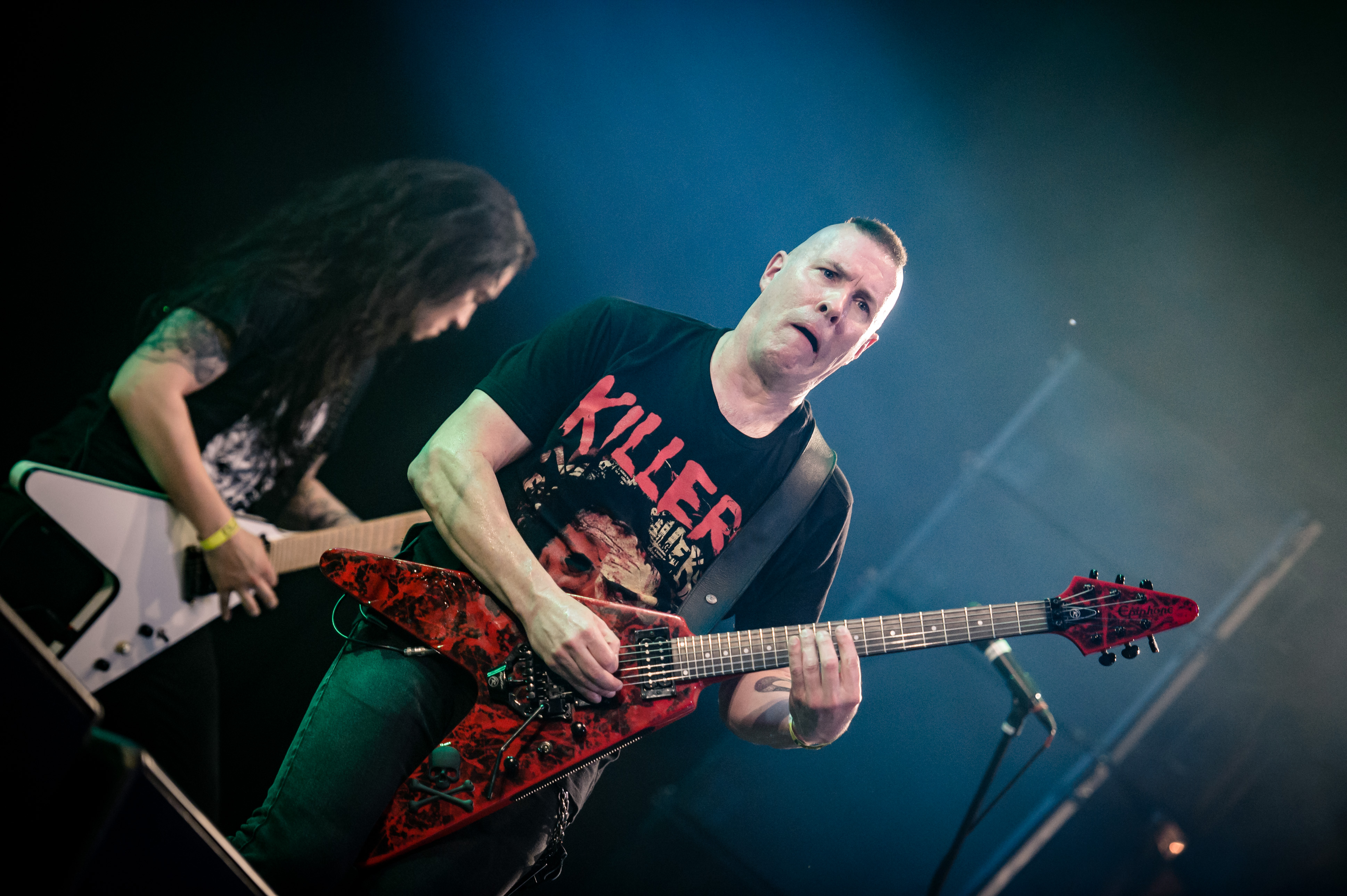 'Wacken Open Air 2017; Wacken': 'Annihilator'